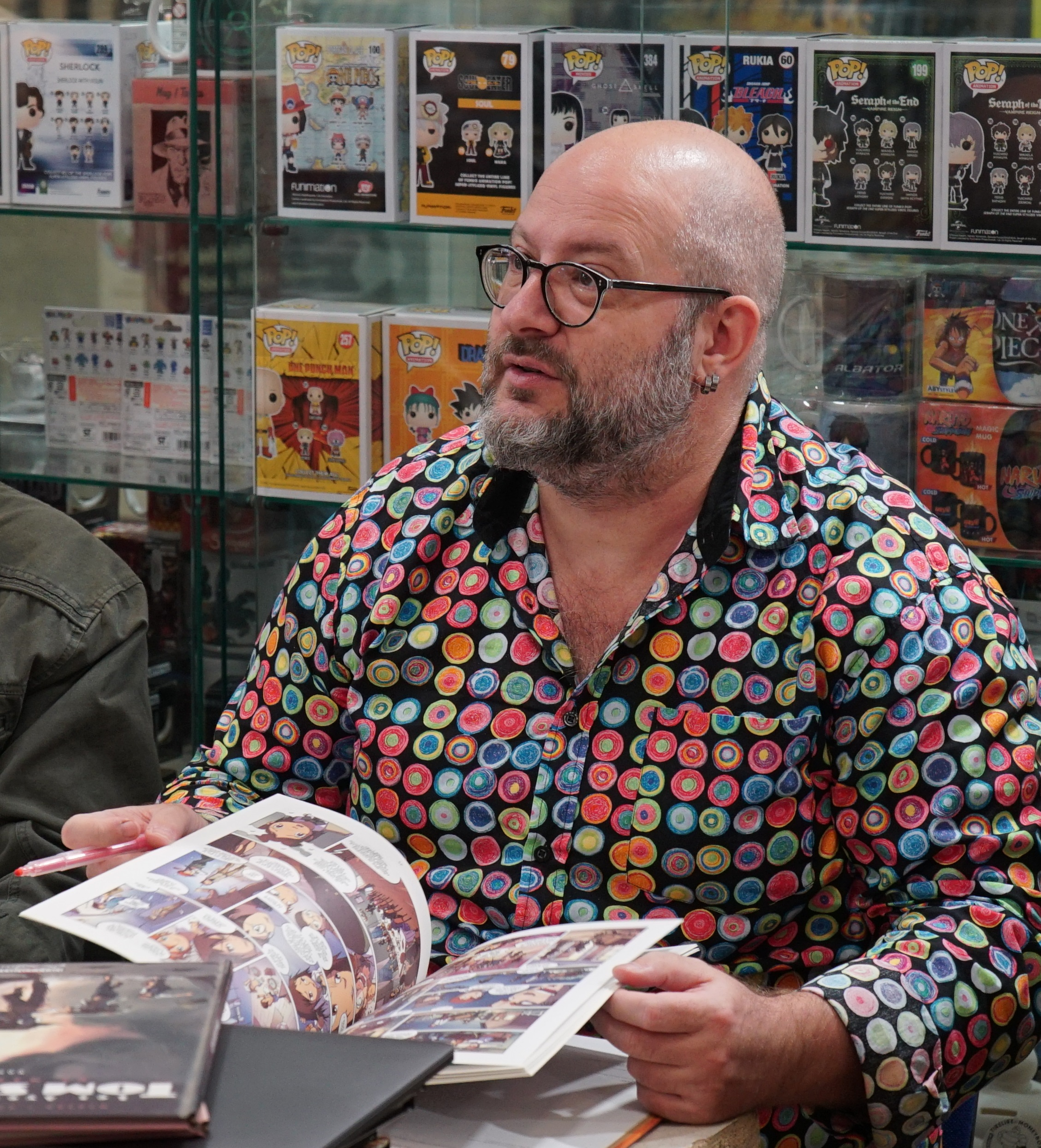 en dédicace à la boutique Bédérama.